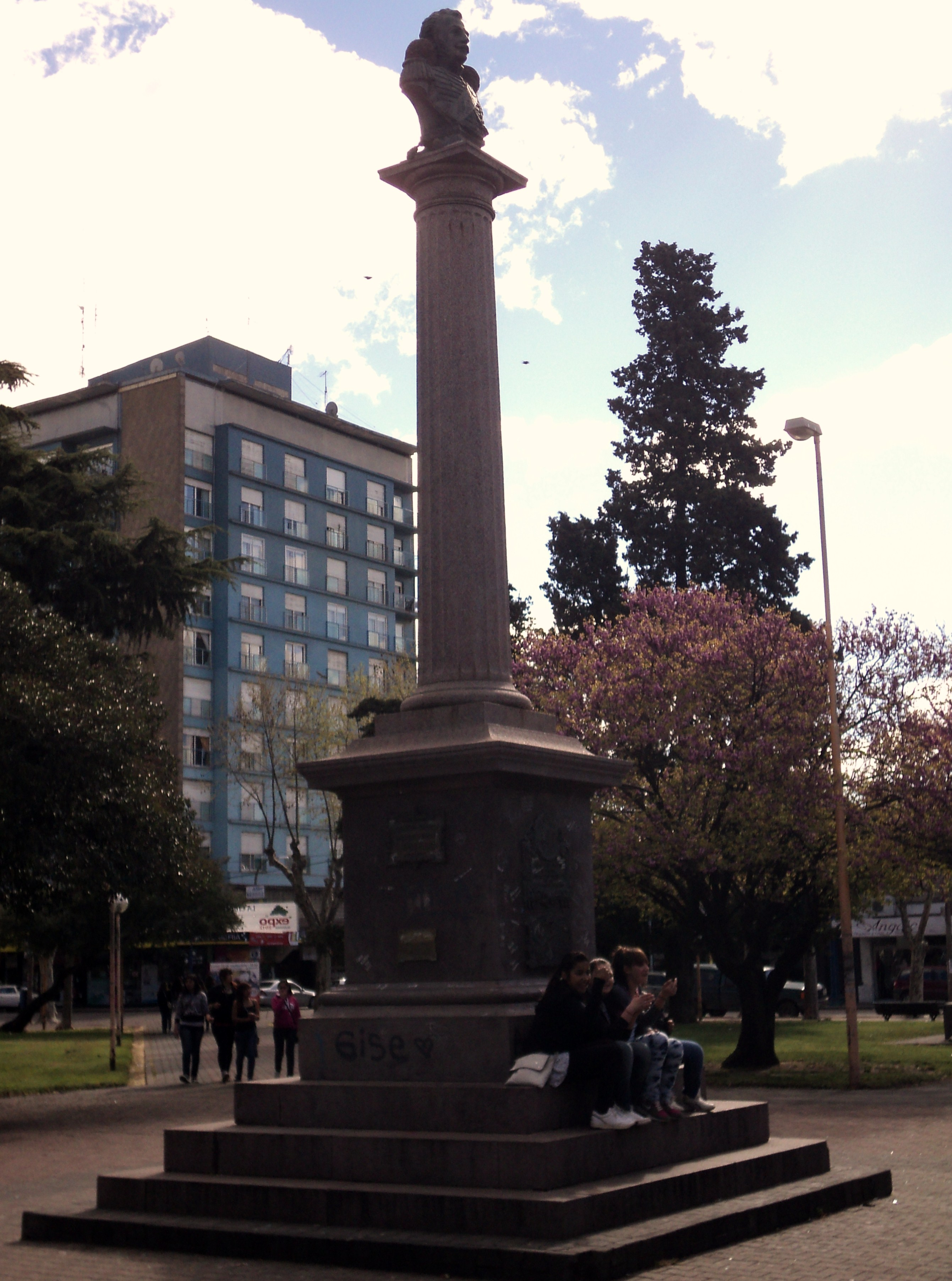 monumento al Grl Olavarria en la ciudad de homónima